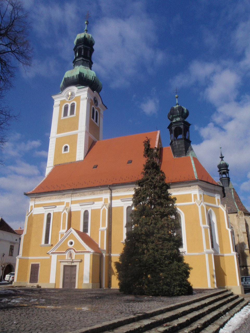 Heiliger Emmerich Kirche Güns